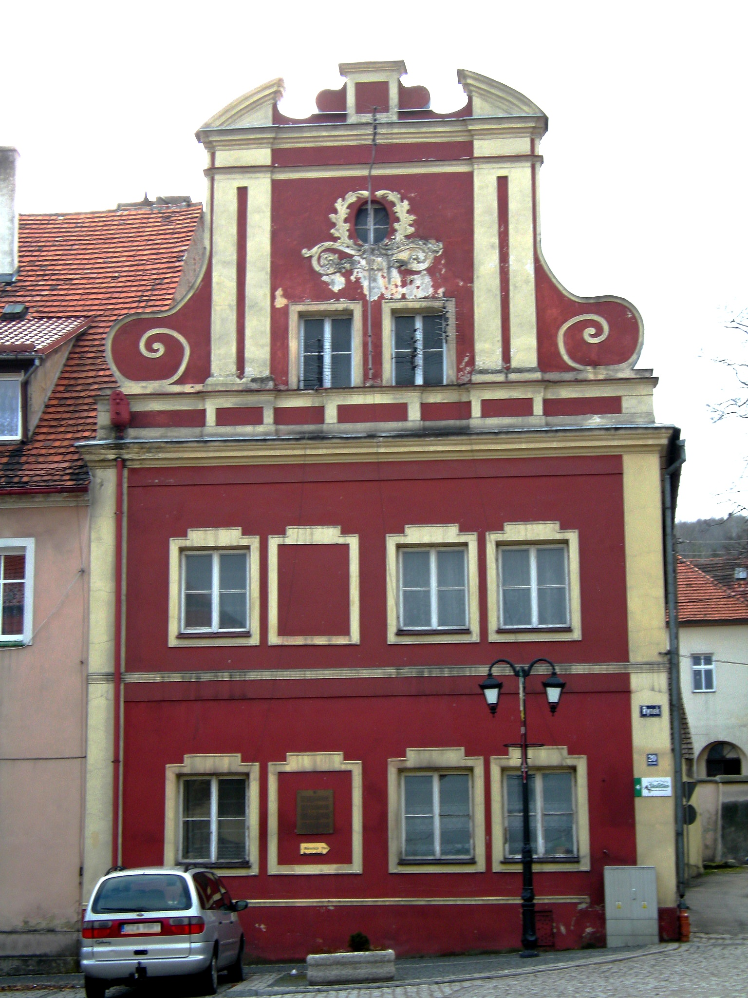 Kamienica Fuggerów adres: Złoty Stok, Rynek 20